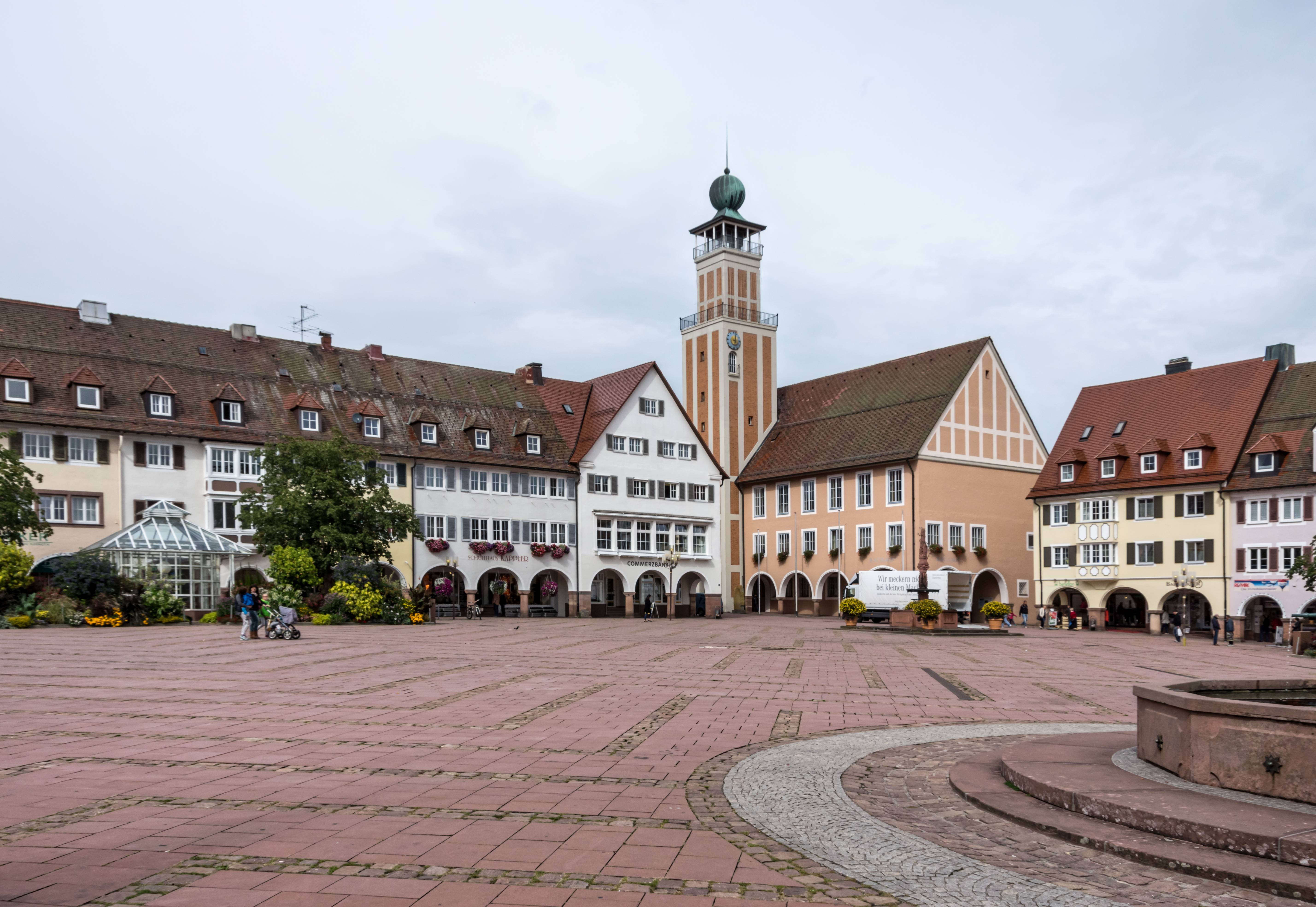 Bilder aus Freudenstadt Der Marktplatz